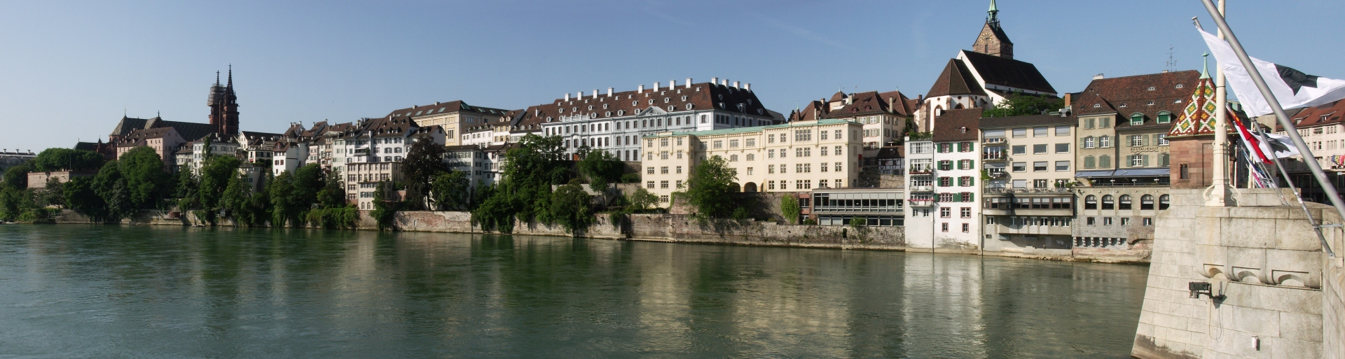 Basel, südliches Rheinufer Basel, southern bank of Rhine